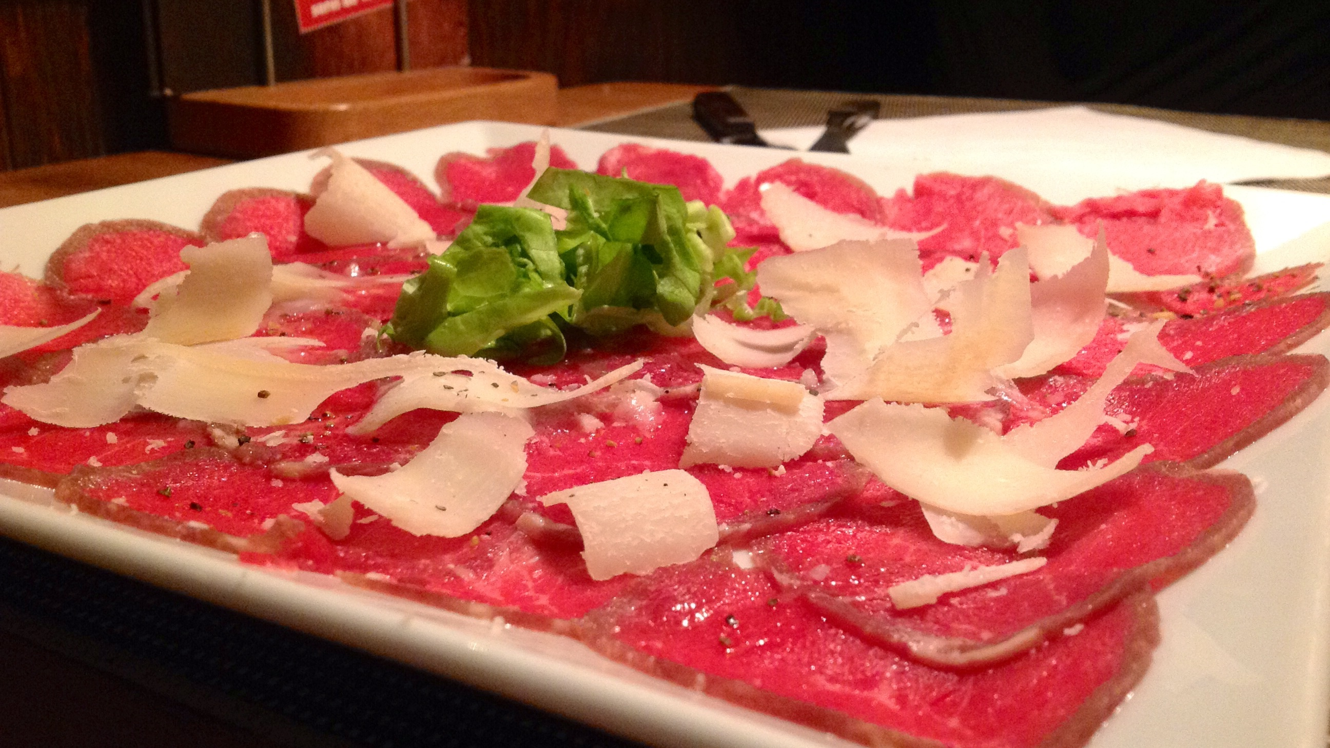 Carpaccio de boeuf parmesan et son filet d'huile d'olive. This is an image of food from Tunisia